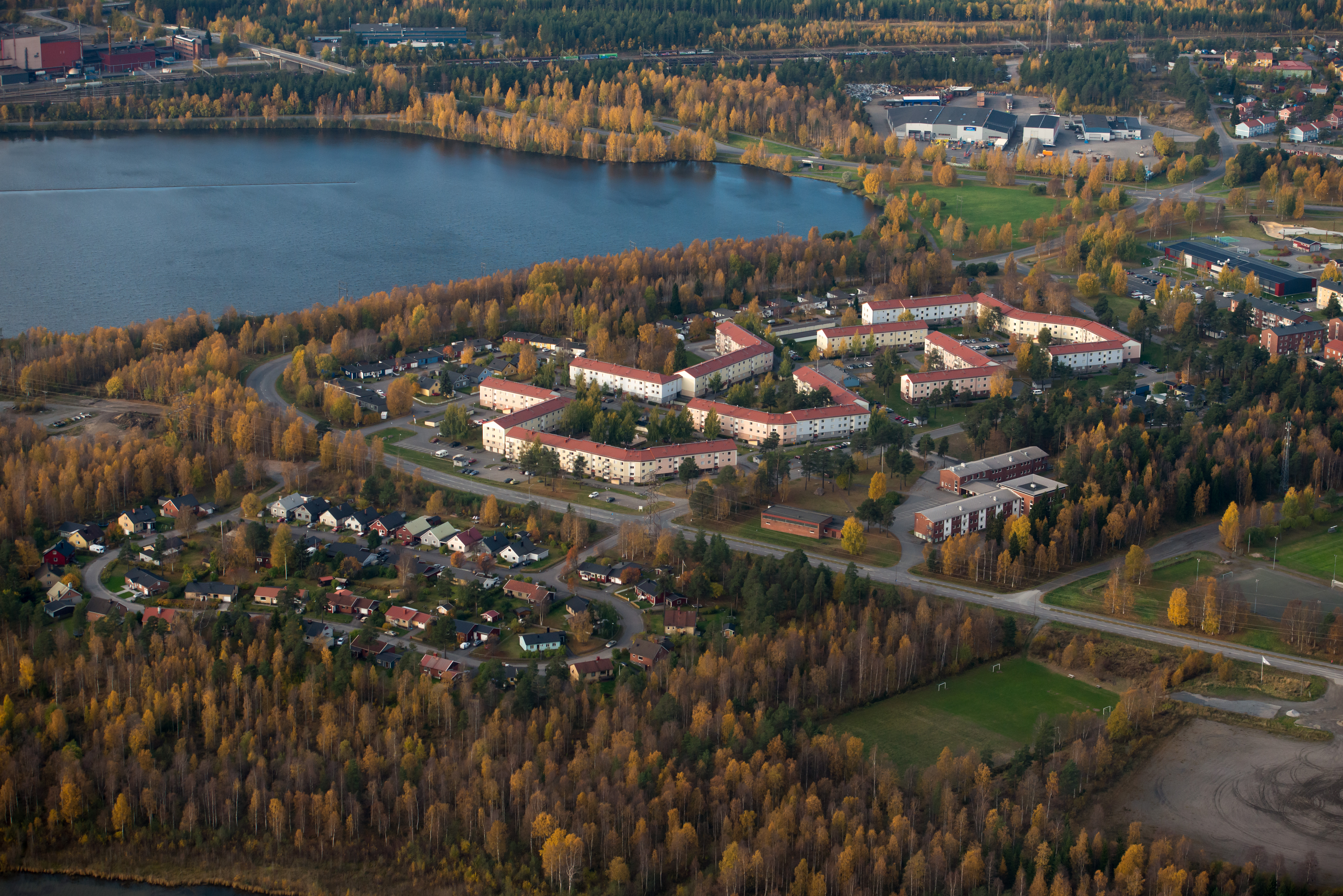 Bostadsområdet Lövskatan nertill och Örnäset mitt i bild.